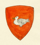 Stemma della famiglia Obriachi